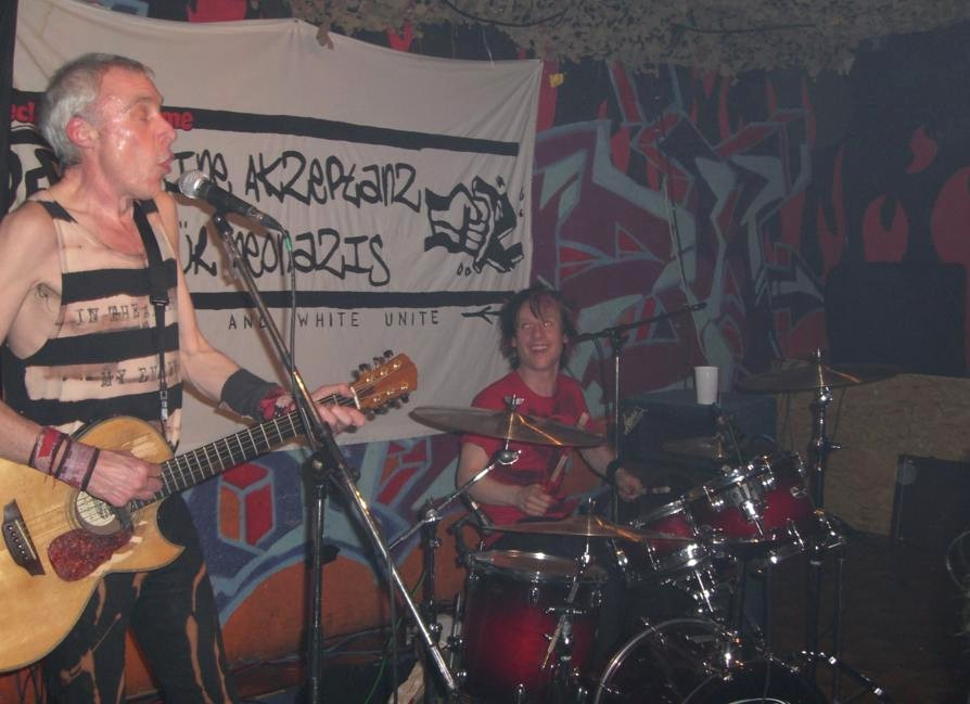 T.V. Smith und Vom Ritchie, 10. Januar 2009, "Esperanza" in Schwäbisch Gmünd.